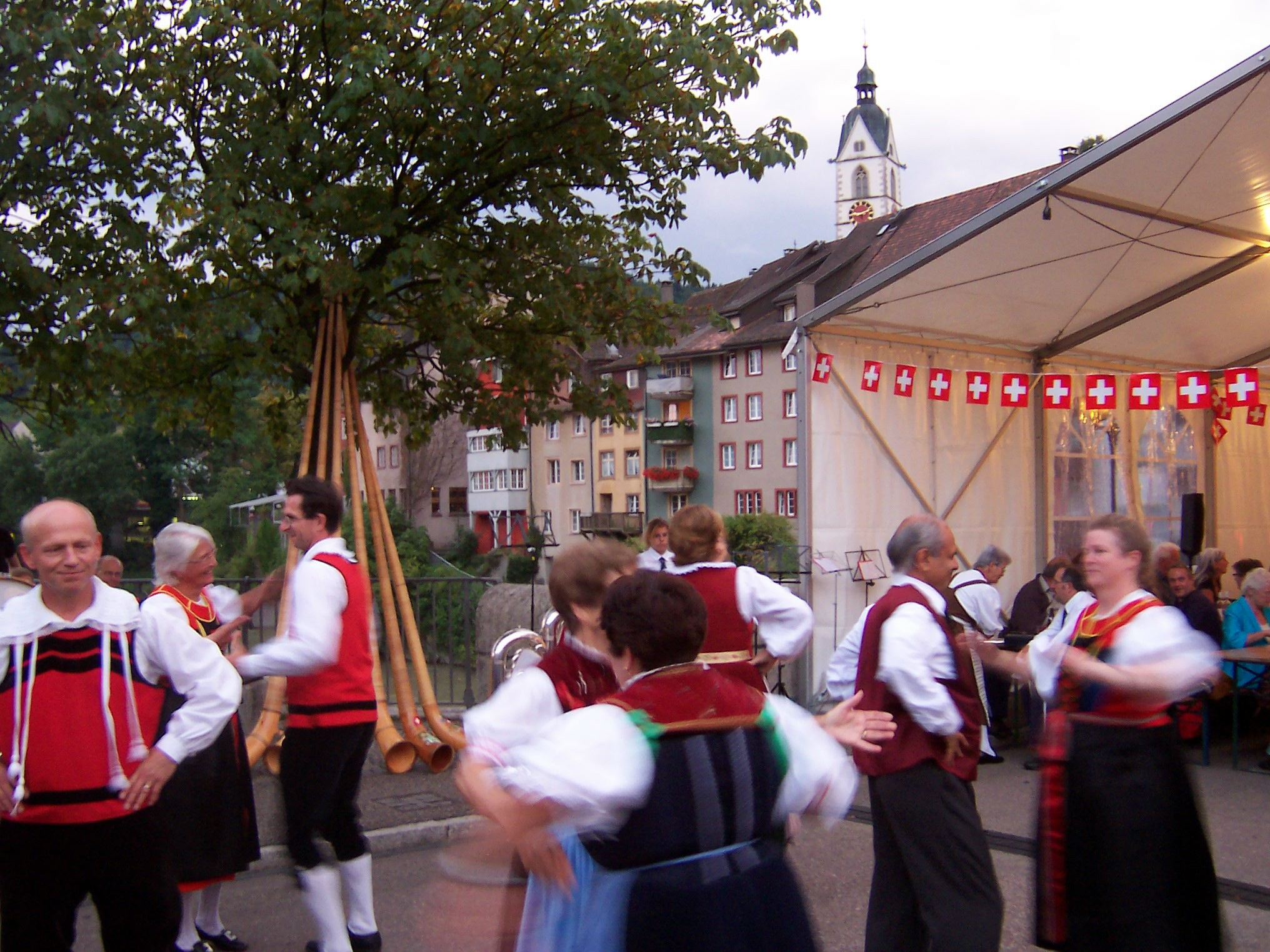 „Volkstanzgruppe Laufenburg“/D an der grenzüberschreitenden 1.August-Feier auf der Alten Rheinbrücke von Laufenburg in Aargau/CH und Baden-Württemberg/D. Im Hintergrund ist der Schweizer Stadtteil sichtbar.